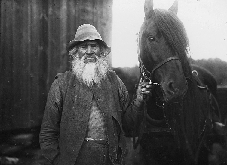 KråkUlof i Bäck, porträtt